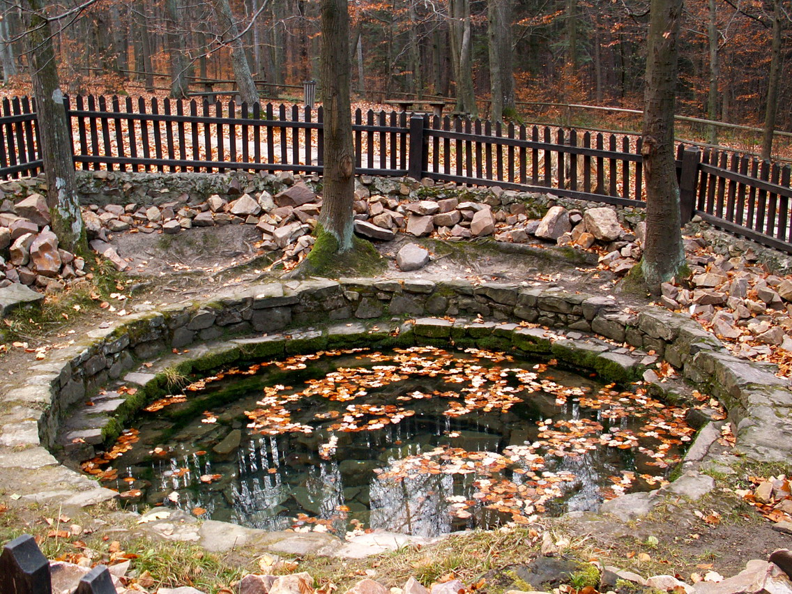 St. Francis spring in Święta Katarzyna (Poland)